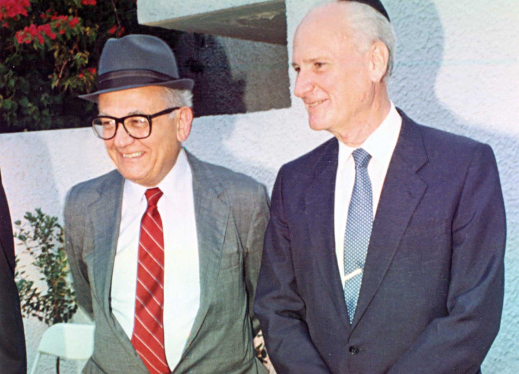 השופטים מאיר שמגר ומנחם אלון